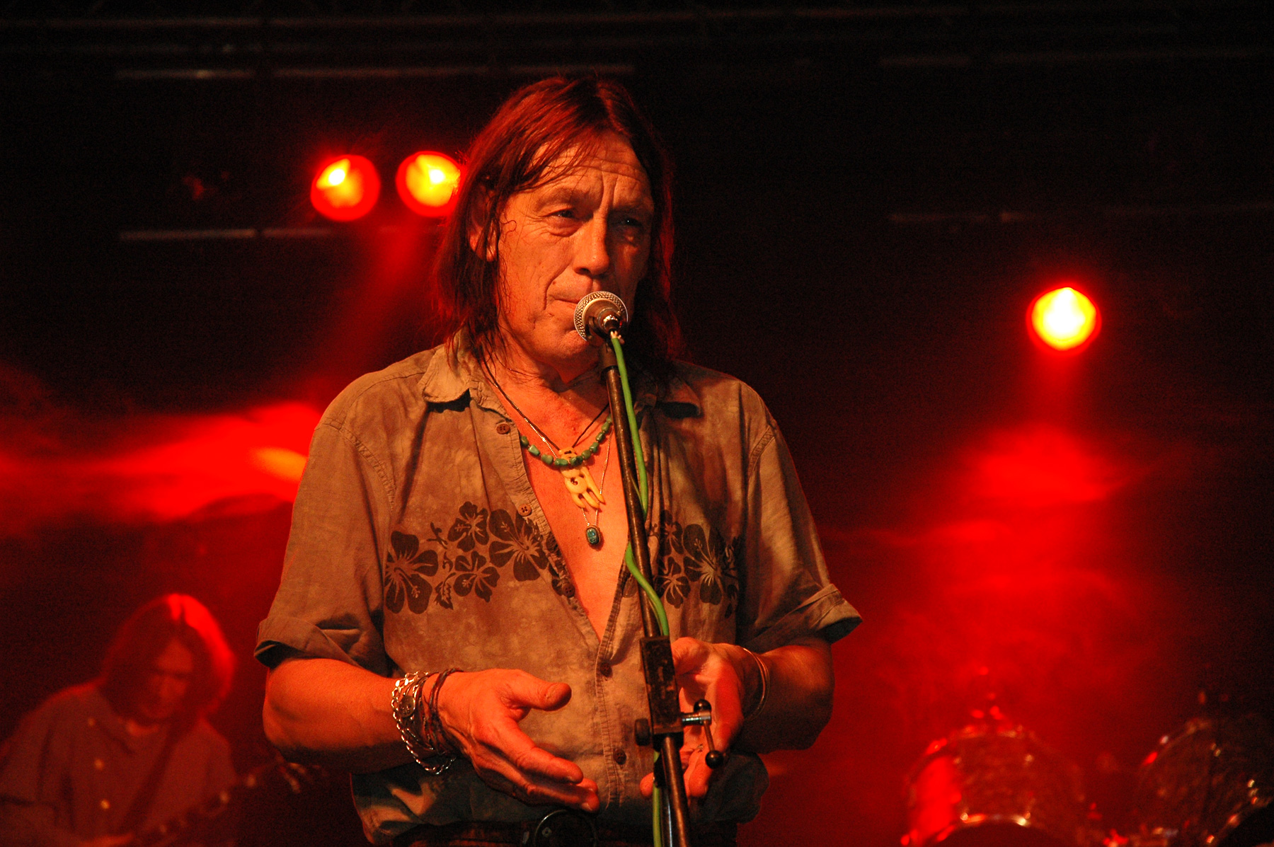 Peter Panka’s Jane live am 11.12.2004, Peter Panka